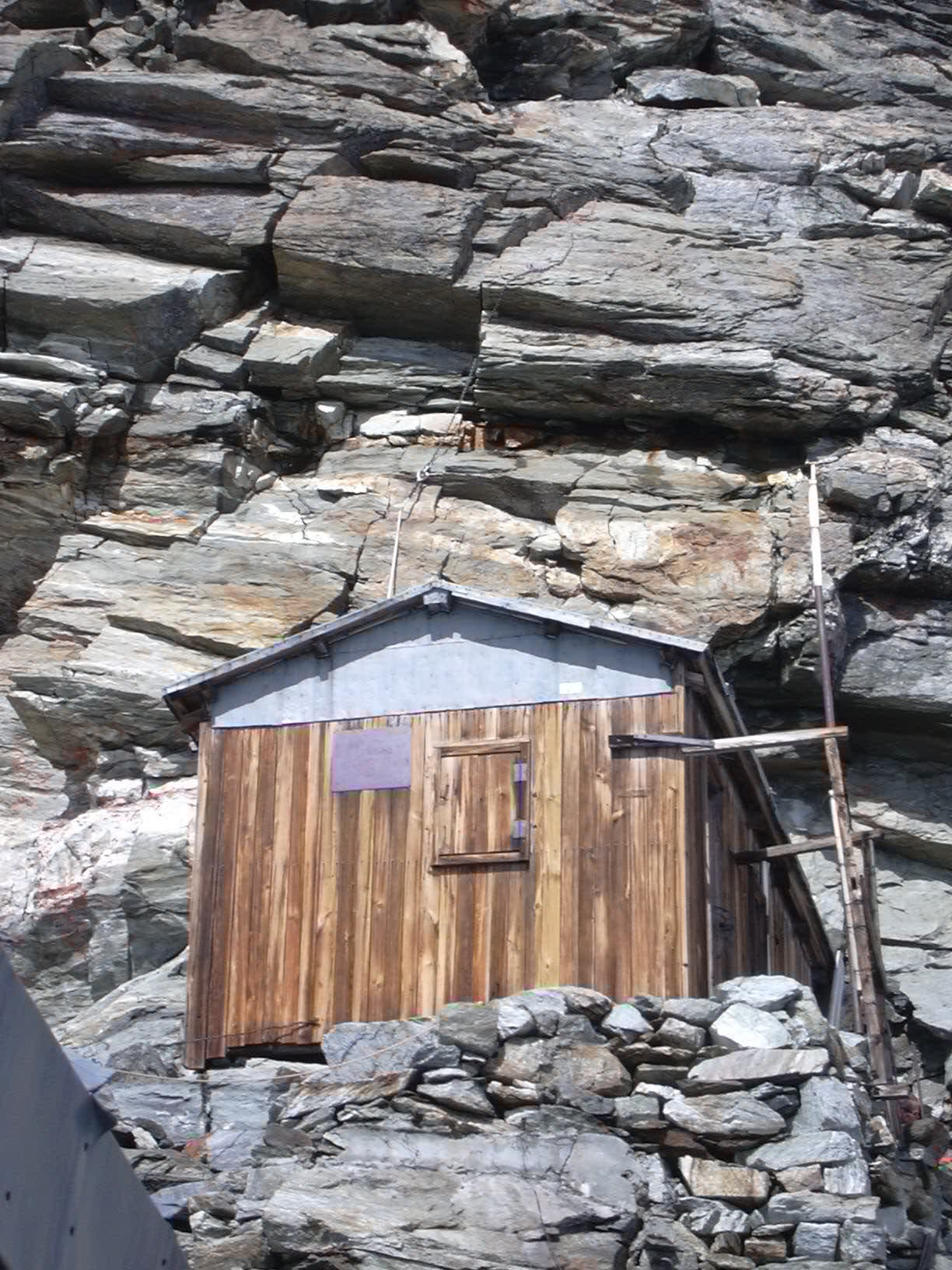 Capanna Luigi Amedeo di Savoia